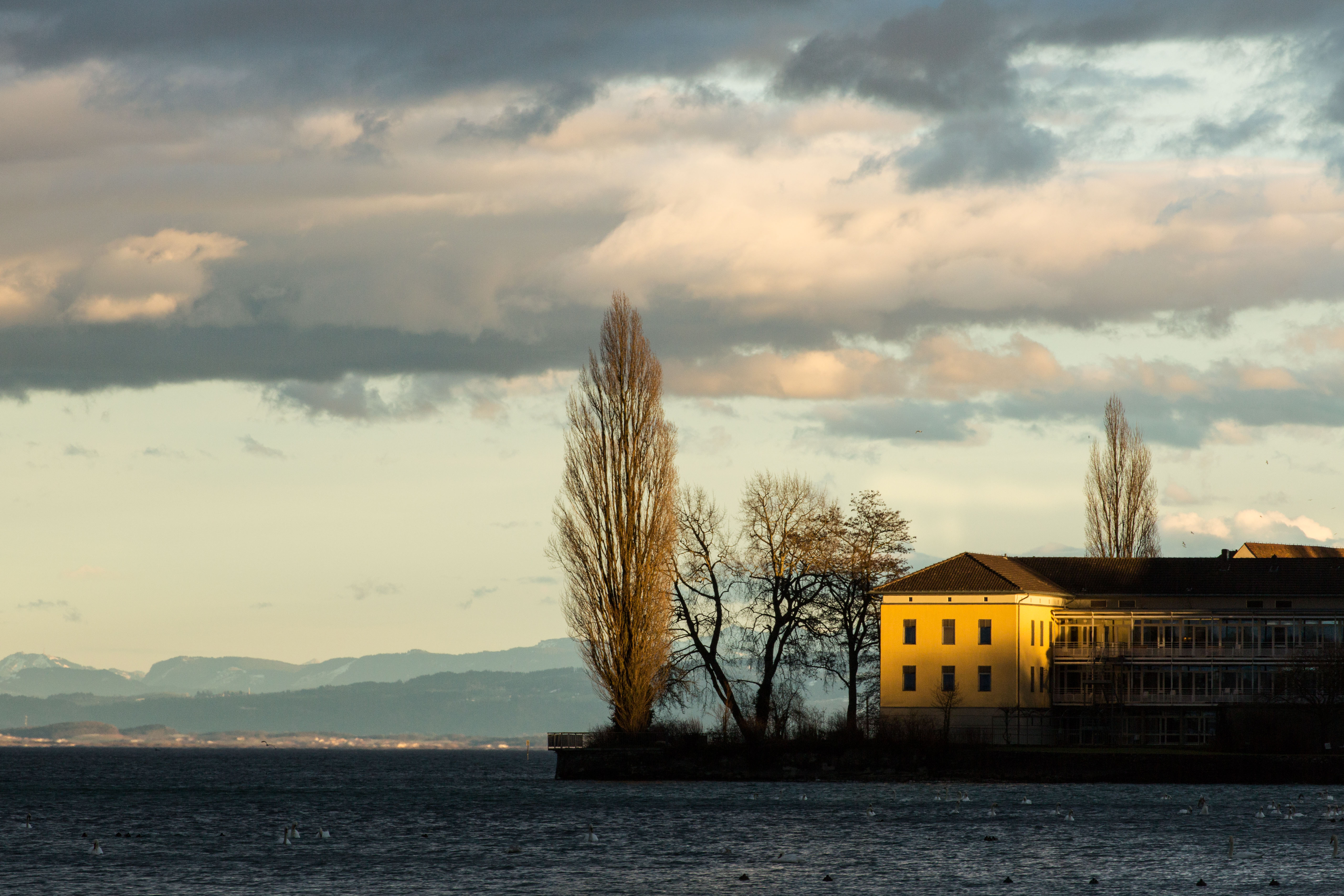 Clinica psichiatrica di Müsterlingen